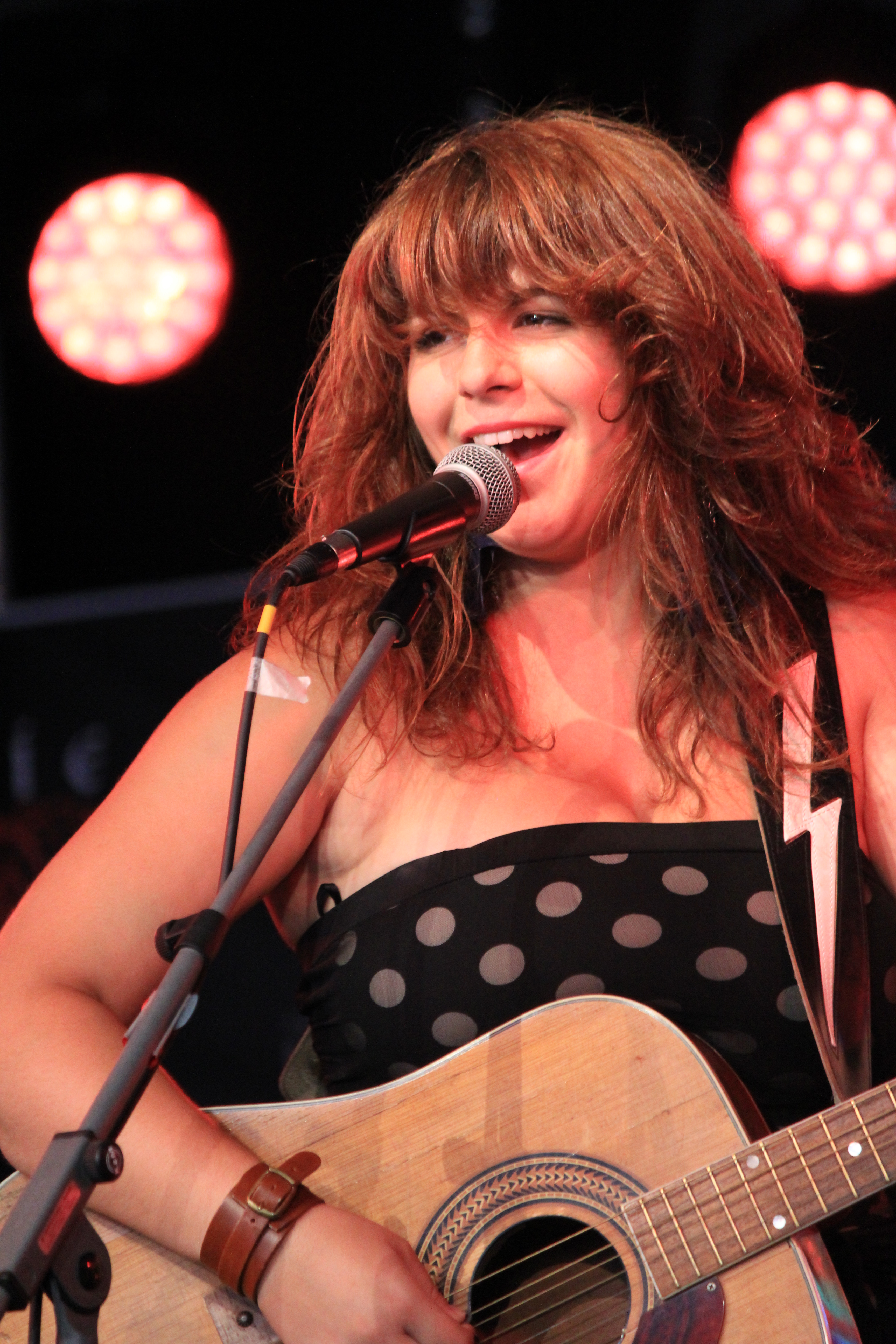 Lisa LeBlanc lors d'un concert organisé au pavillon acadien organisé dans le cadre du festival interceltique de Lorient 2012.